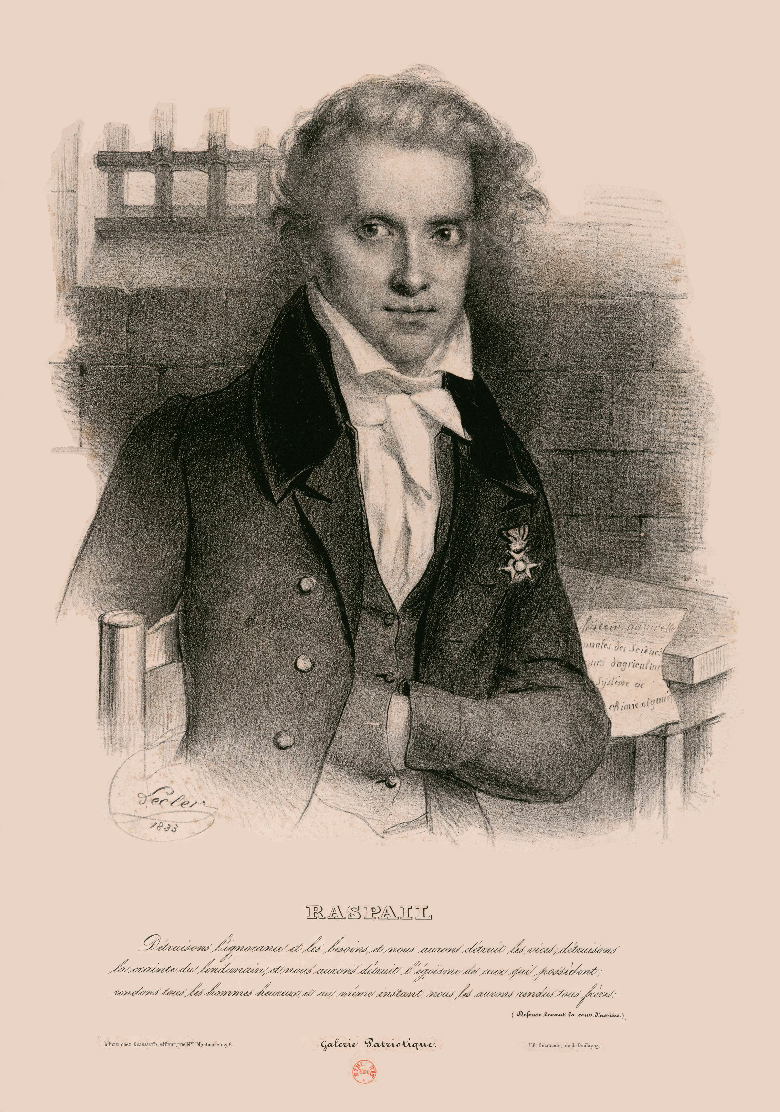 François-Vincent Raspail, estampe du XIXe siècle. « Détruisons l'ignorance et les besoins, et nous aurons détruit les vices; détruisons la crainte du lendemain, et nous aurons détruit l'égoïsme de ceux qui possèdent ; rendons tous les hommes heureux, et au même instant, nous les aurons rendus frères. » (défense devant la cour d'assises).